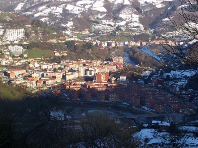 Fotografía de Sotrondio y Blimea tomada desde La Envernal (Asturias).